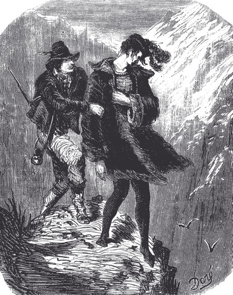 Illustration pour le "Manfred" de Lord Byron par Gustav Doré (1853)